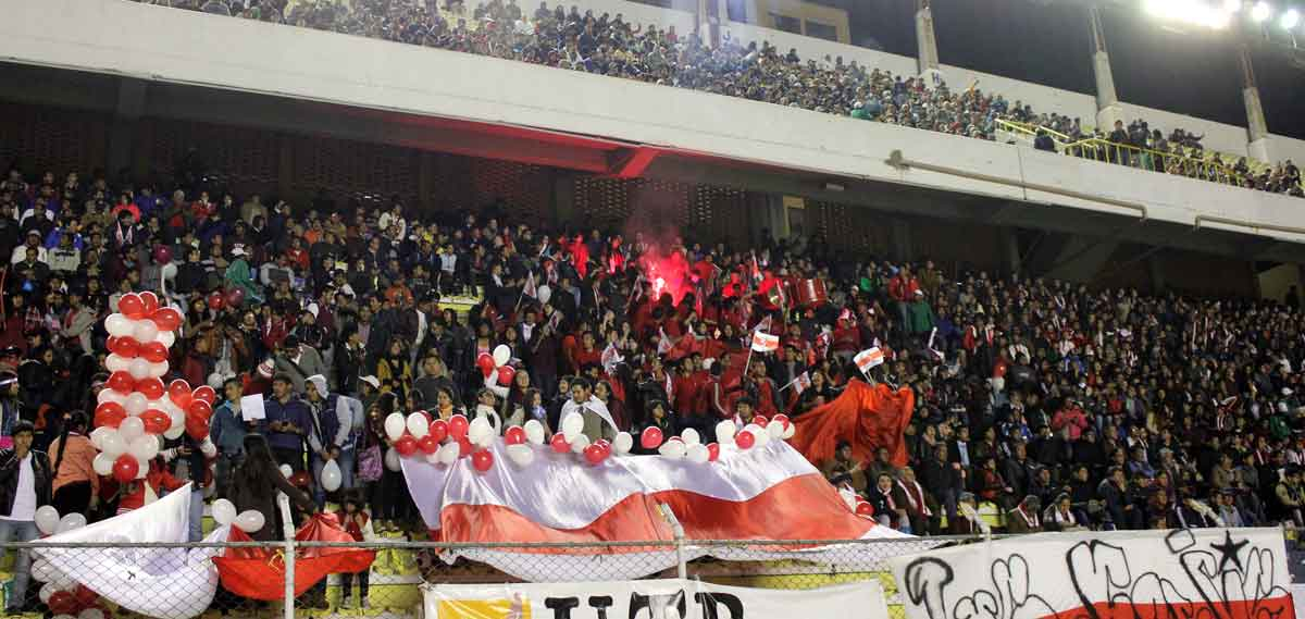 La Mafia Roja alentando al equipo en la recta general del Estadio Hernando Siles.